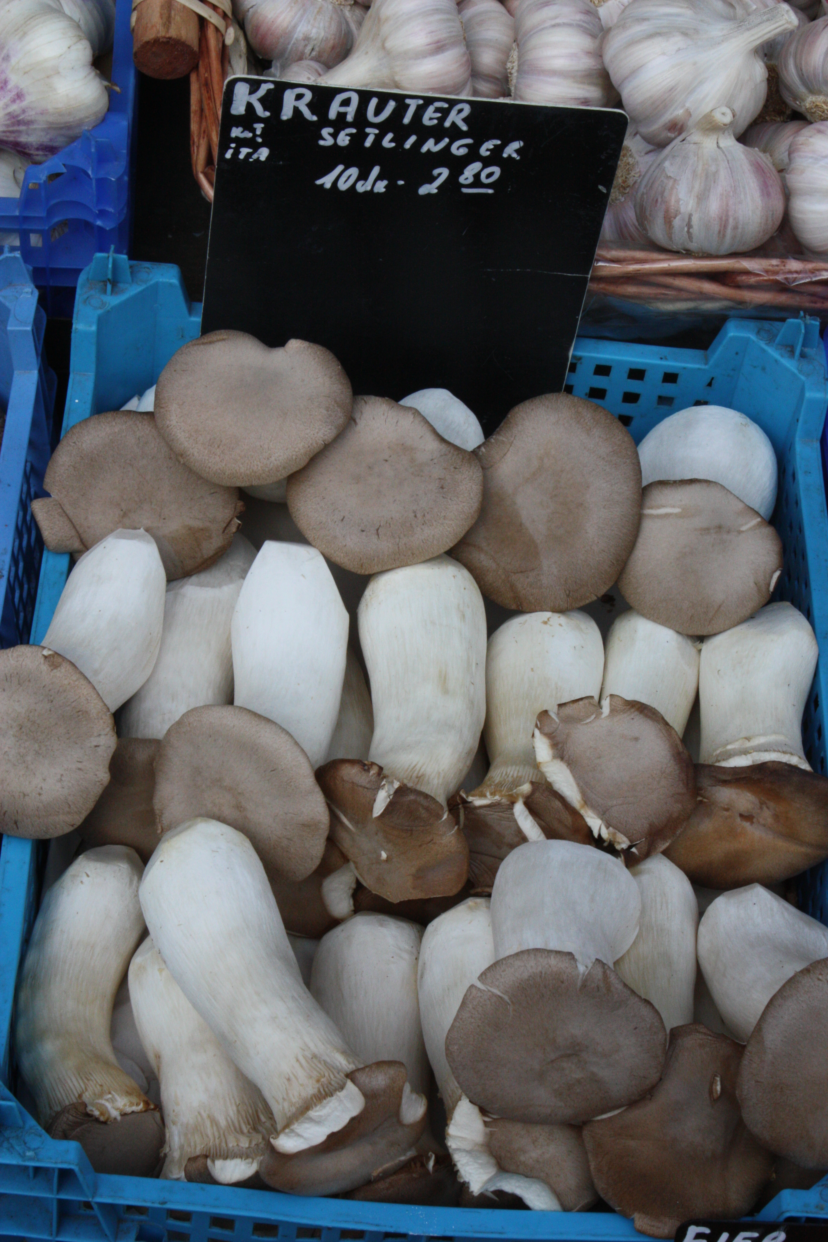 Naschmarkt, Vienna, Wien